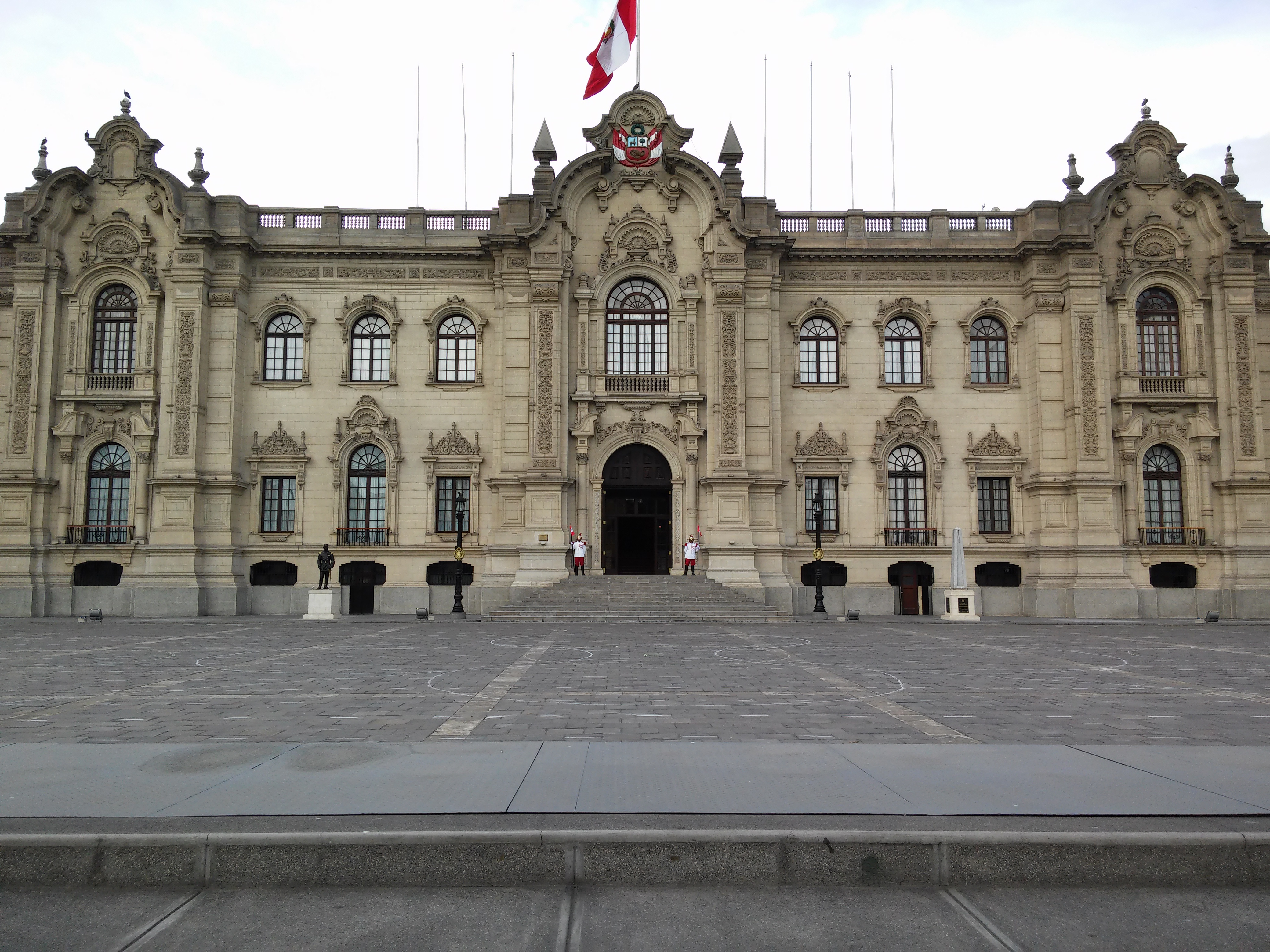 Fotografía de la Casa de Gobierno del Perú, sede del Poder Ejecutivo.